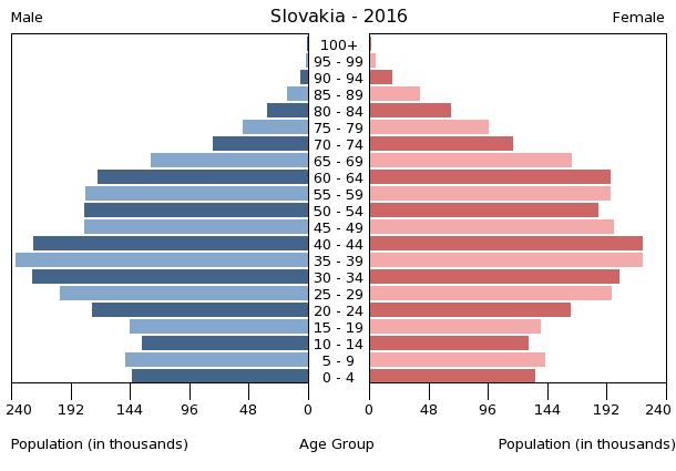 A population pyramid illustrates the age and sex structure of a country's population and may provide insights about political and social stability, as well as economic development. The population is distributed along the horizontal axis, with males shown on the left and females on the right. The male and female populations are broken down into 5-year age groups represented as horizontal bars along the vertical axis, with the youngest age groups at the bottom and the oldest at the top. The shape of the population pyramid gradually evolves over time based on fertility, mortality, and international migration trends.